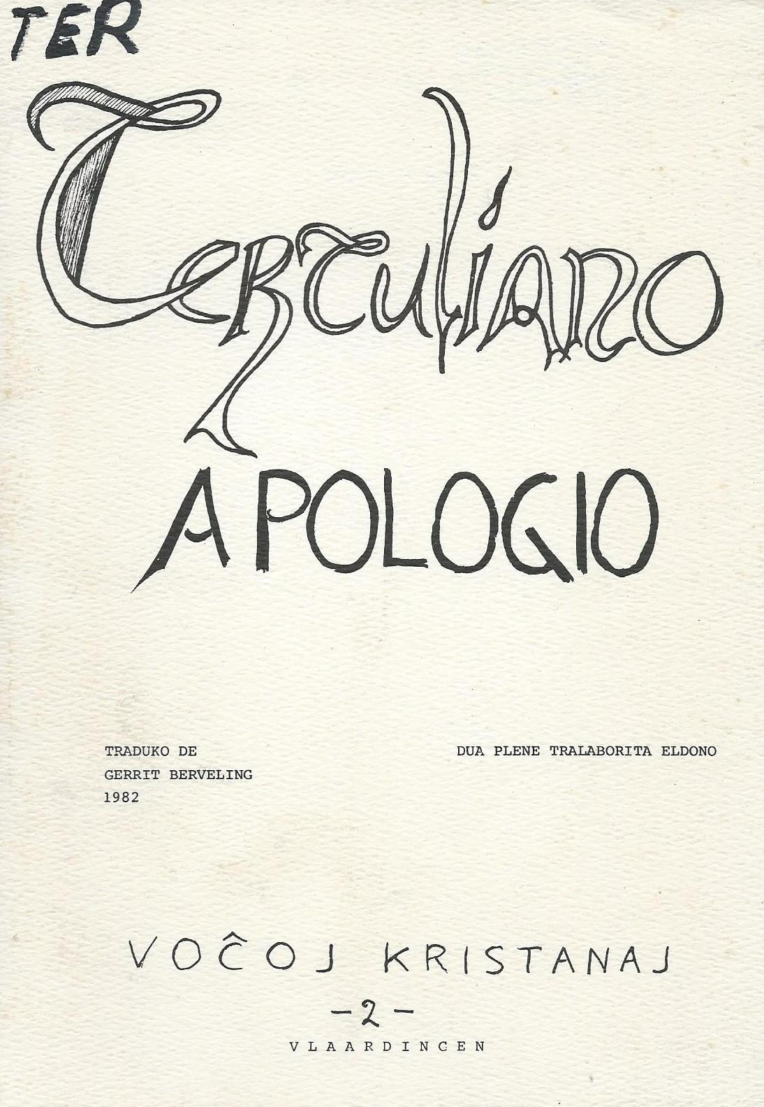 kovrilo de libro "Apologio", 1982